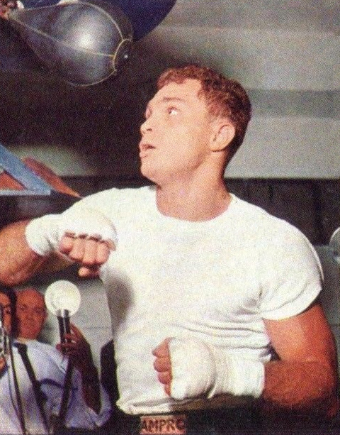 CAMPIONI dello SPORT 1966/67-Figurina n.374- ORTIZ - PUGILATO -Rec